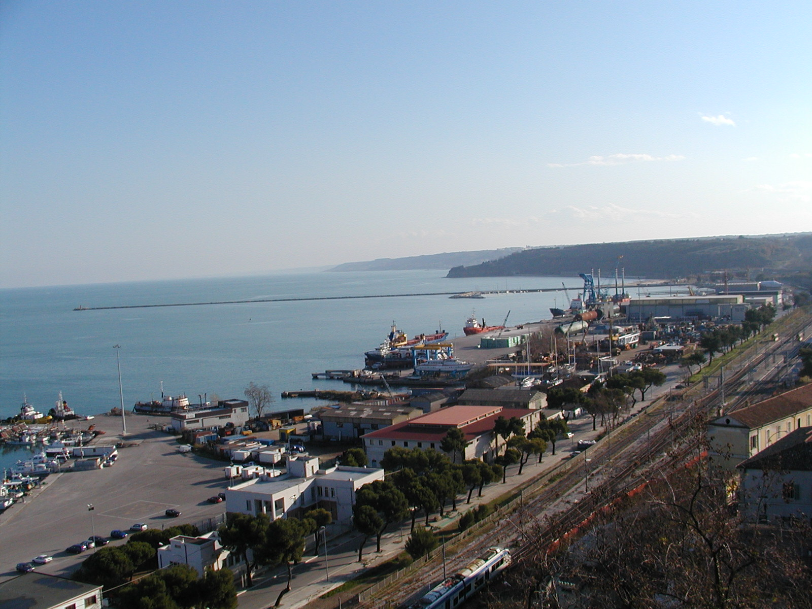 Die Hafen